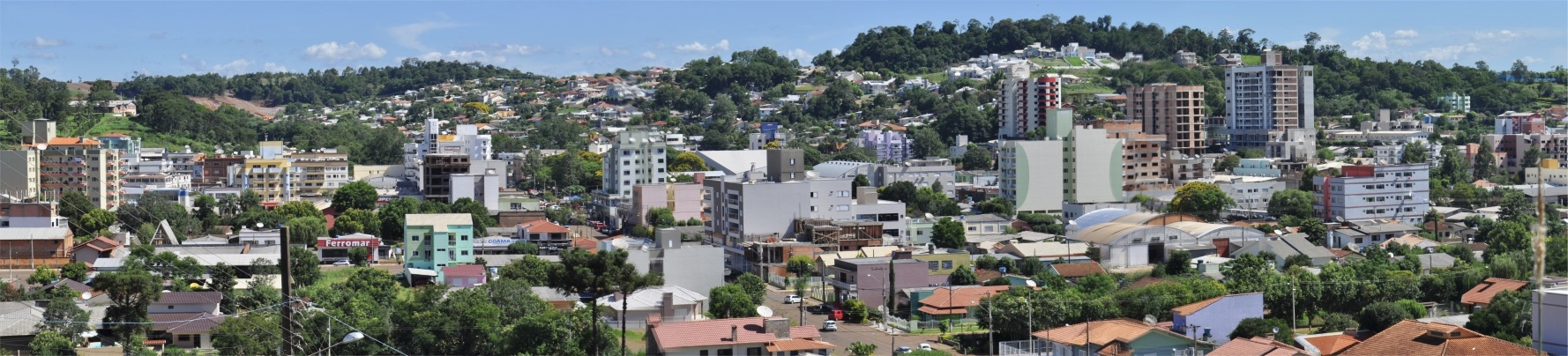 Parcial - Maravilha SC 2012